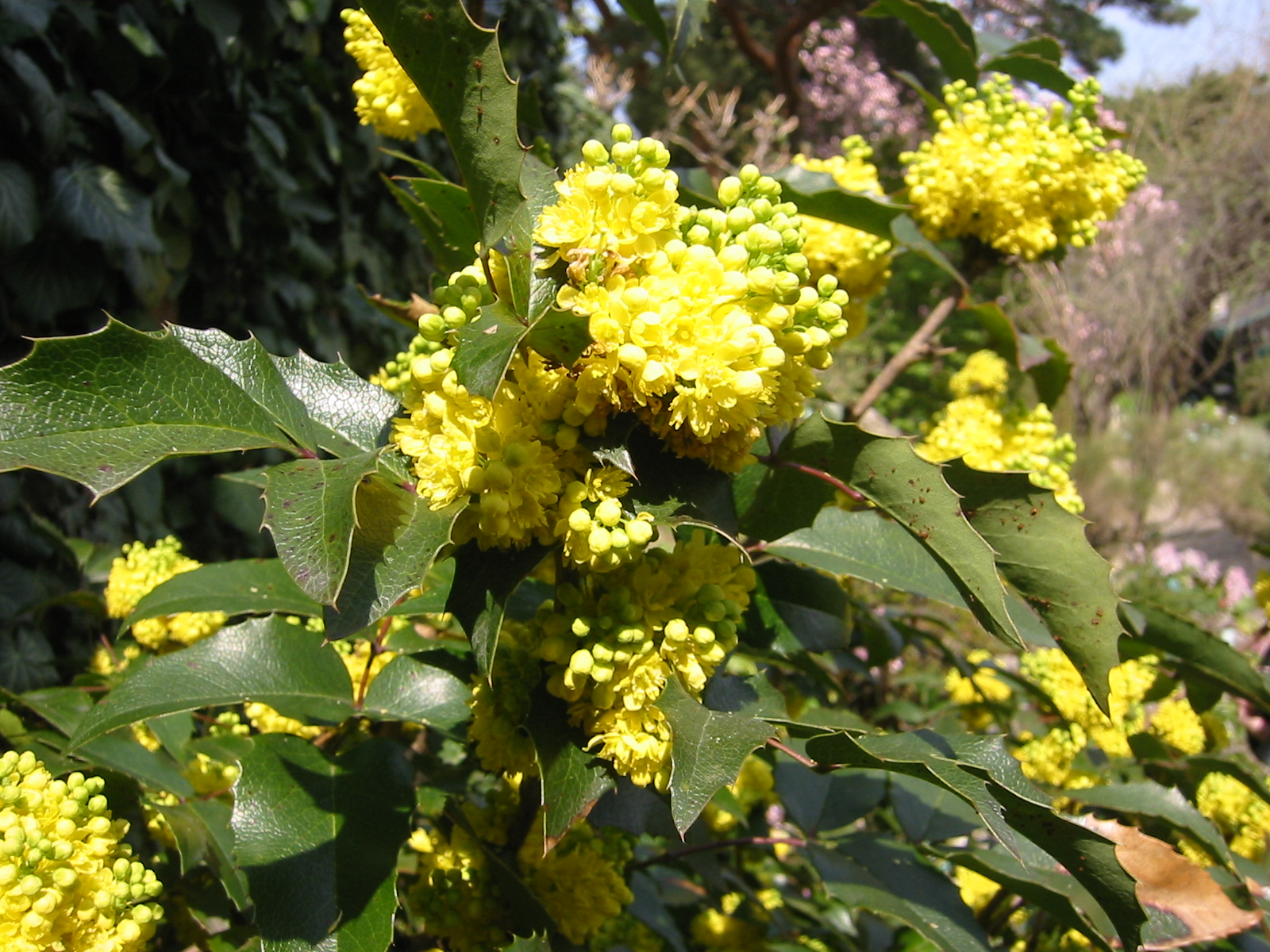 Berberidaceae_Mahonia_nervosa